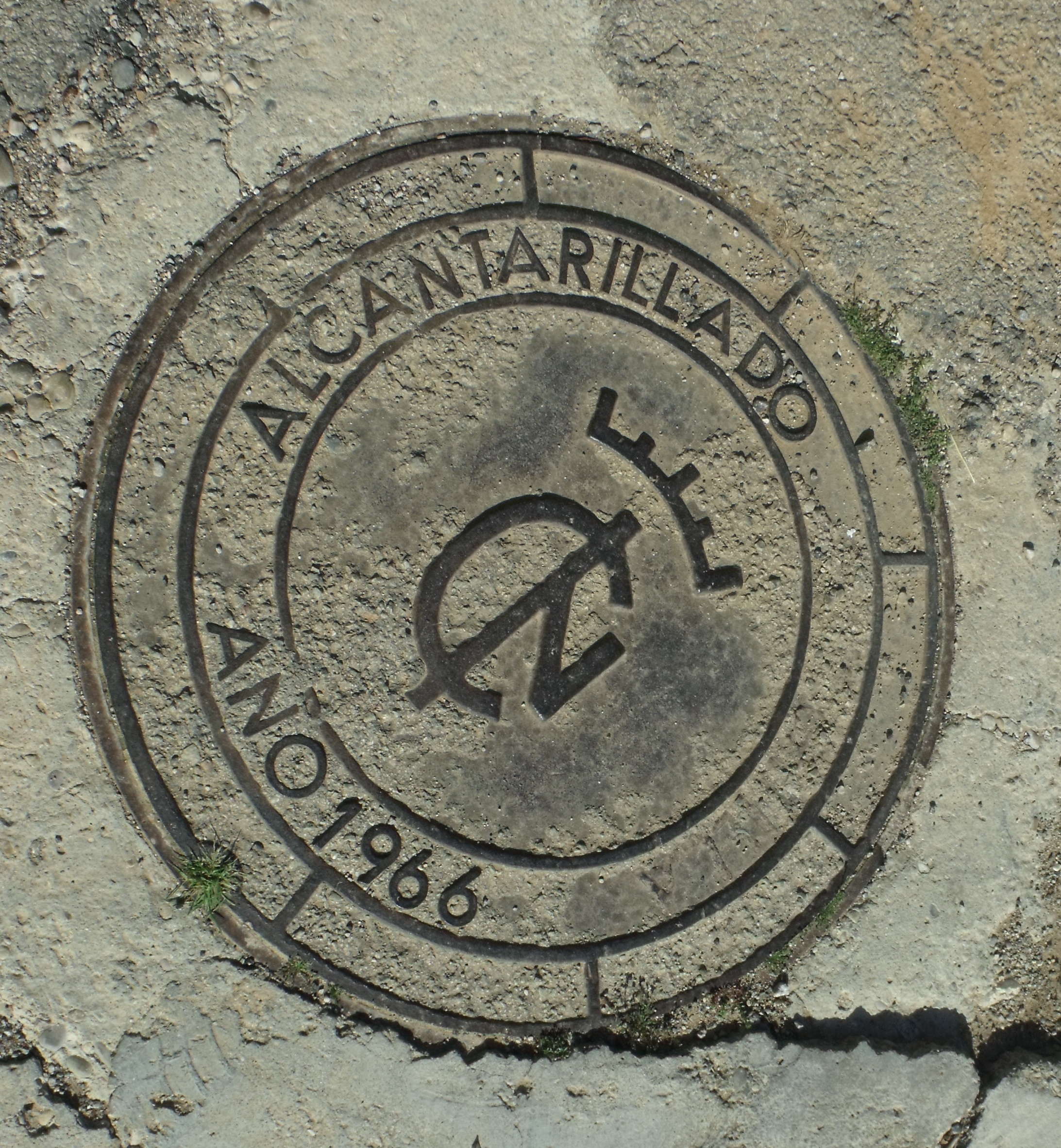 Cortichelles, Turís. Trapa del Instituto Nacional de Colonización, que edificó el pueblo.